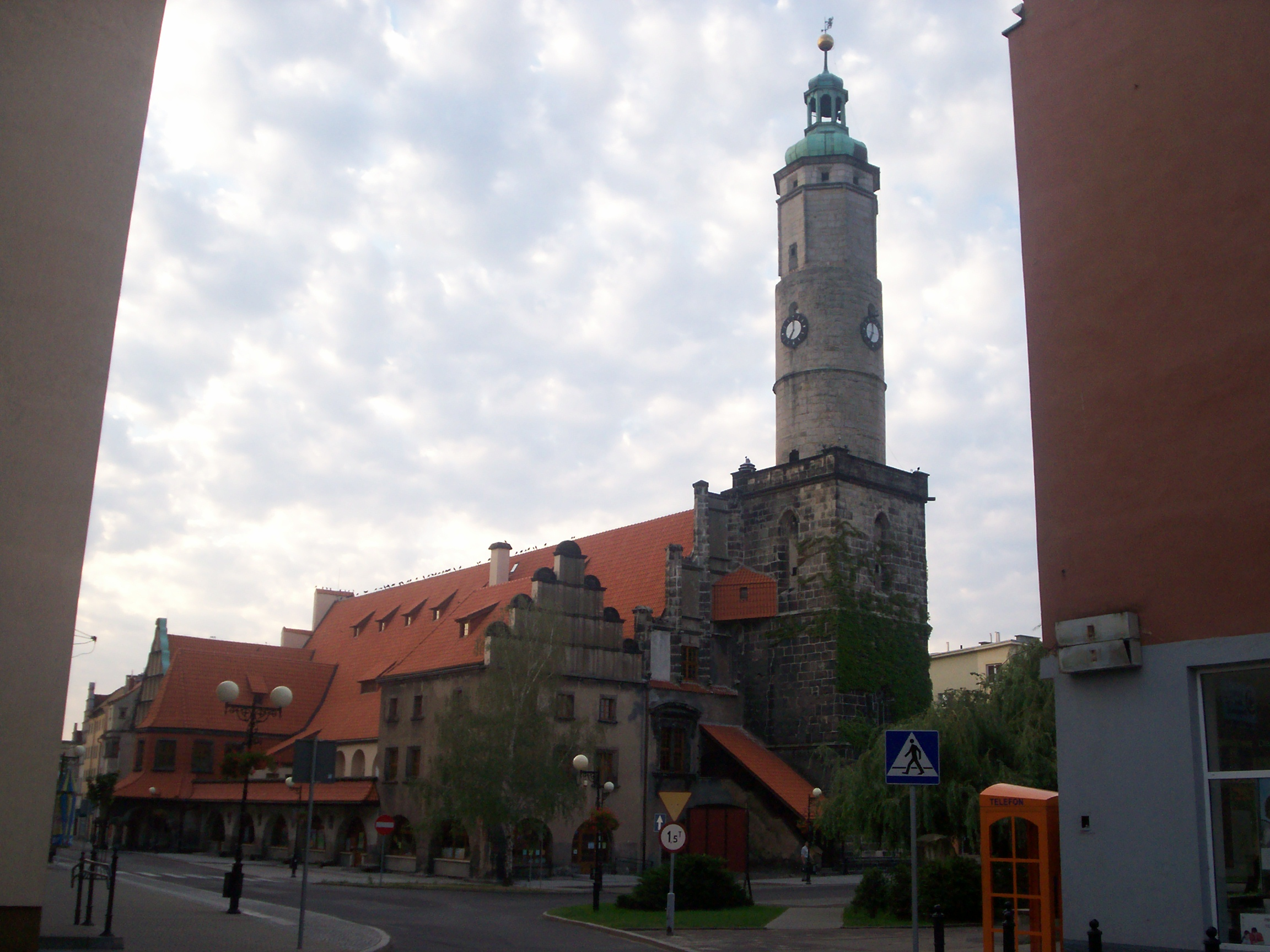 Ratusz we Lwówku Ślaskim